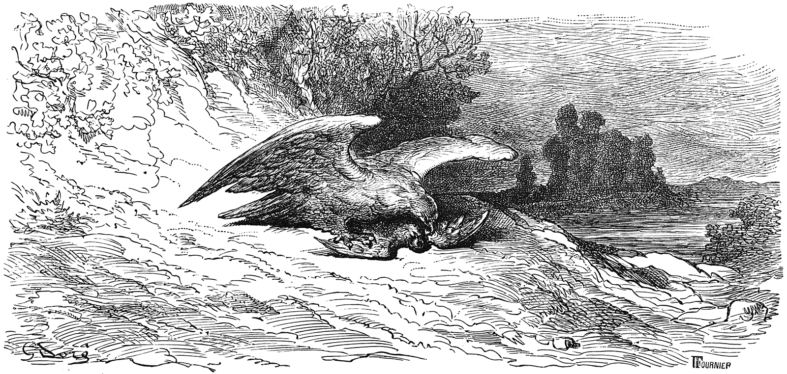 grafika z książki PL Bajki, Jean de La Fontaine, nakładem i drukiem Jana Noskowskiego, Warszawa 1876